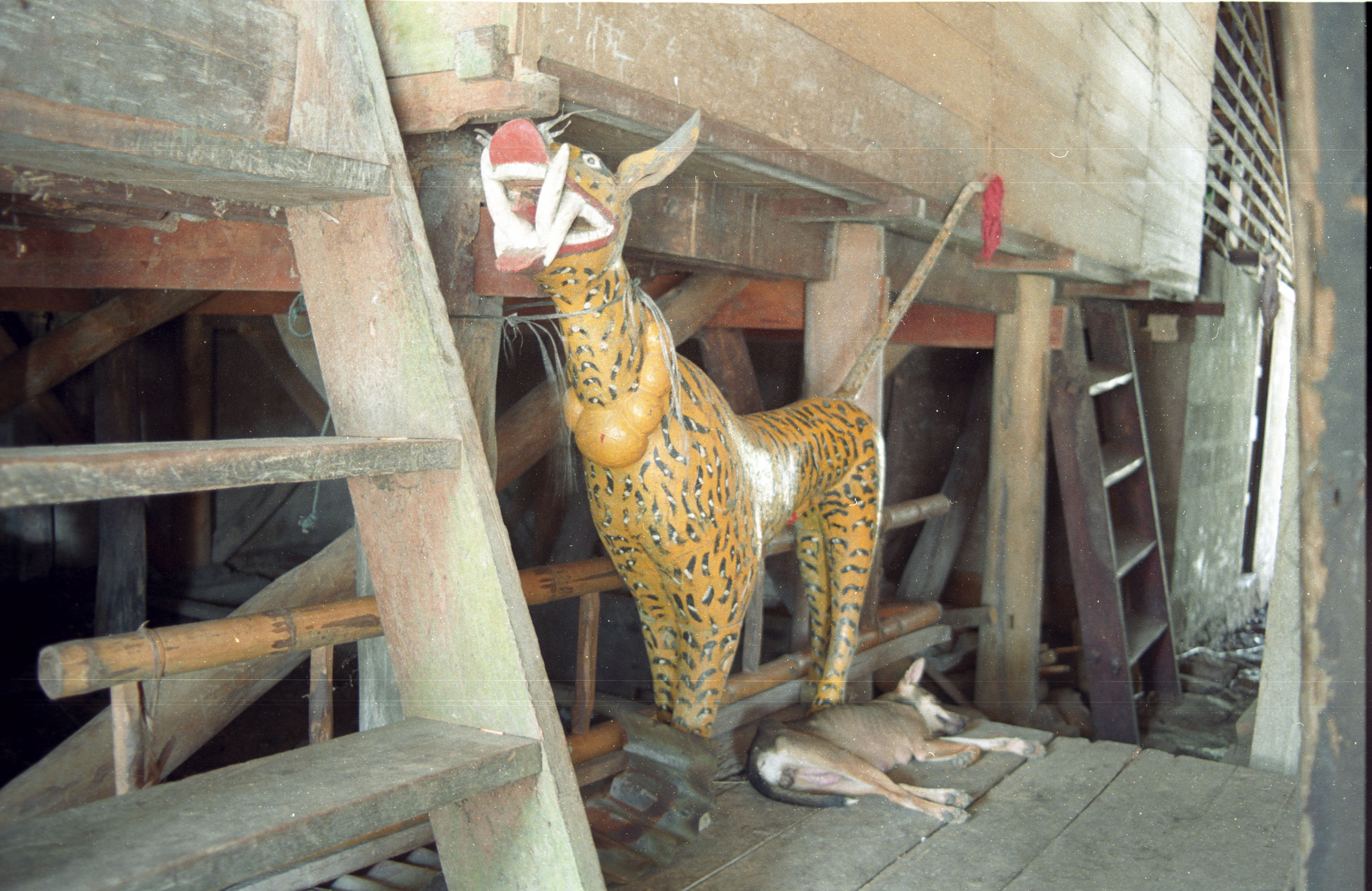 Feticcio aforma di tigre del villaggio di hili Simaetano. Usato nelle cerimonie per combattere le epidemie.